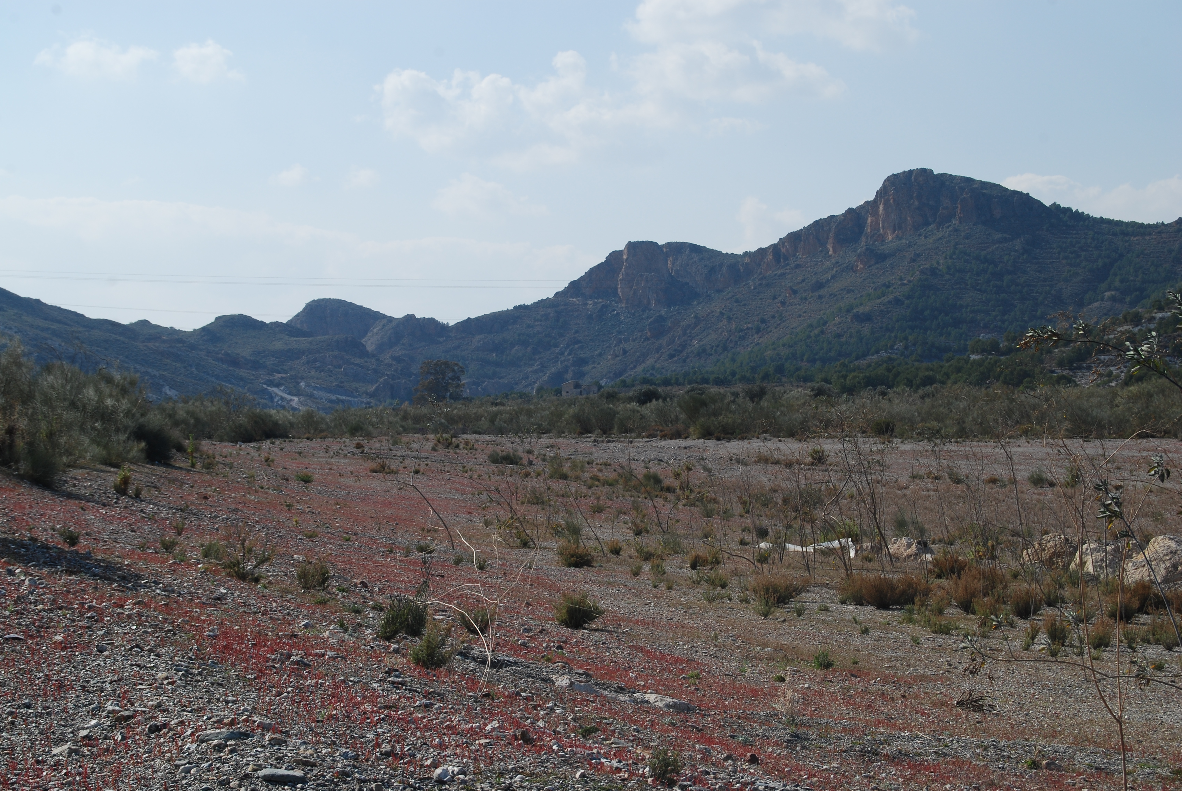 Vista del Peñón del Enjambre y las Peñas de Béjar desde la Rambla de Béjar